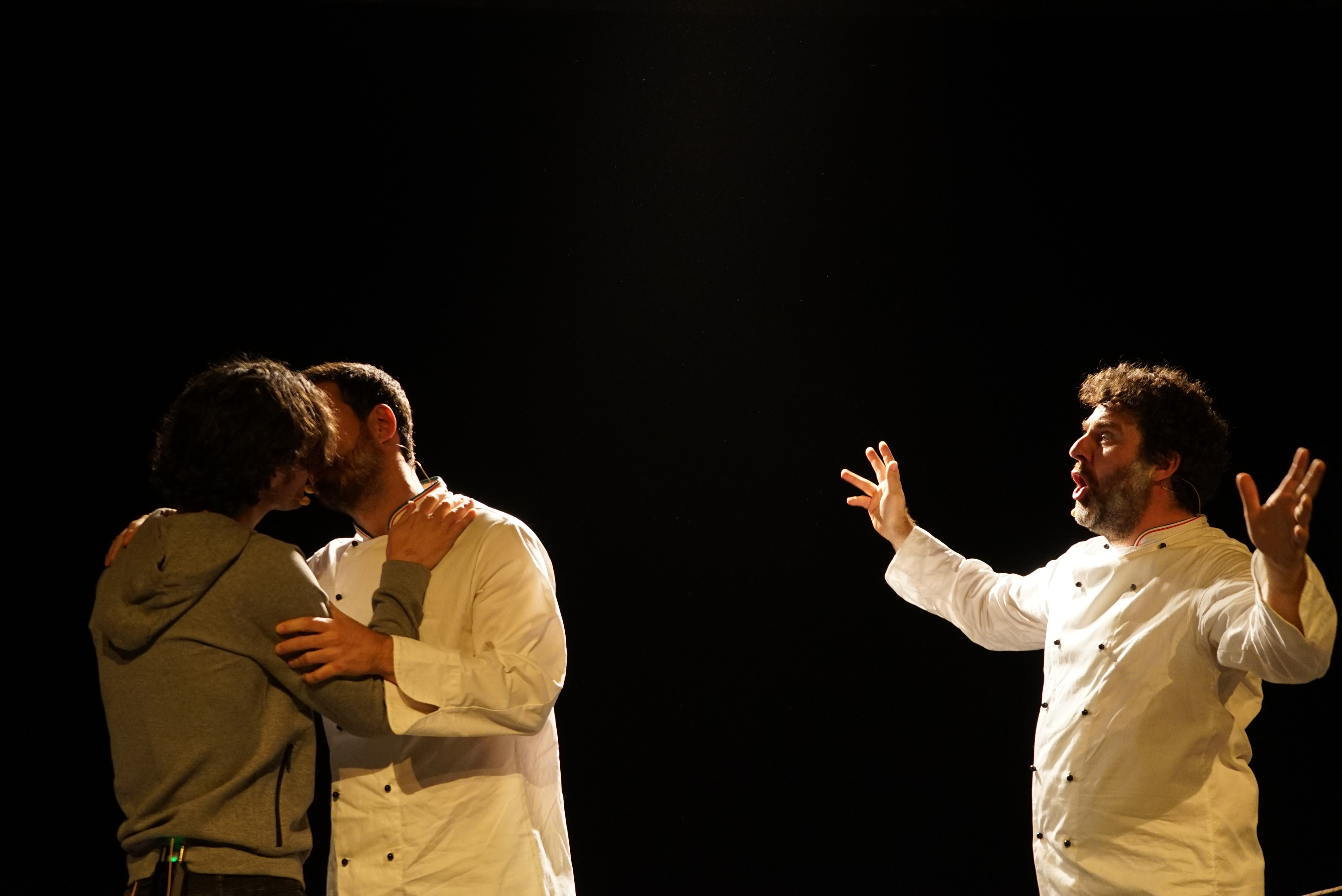 lors du Catch d'improvisation théâtrale au Temps des cerises.